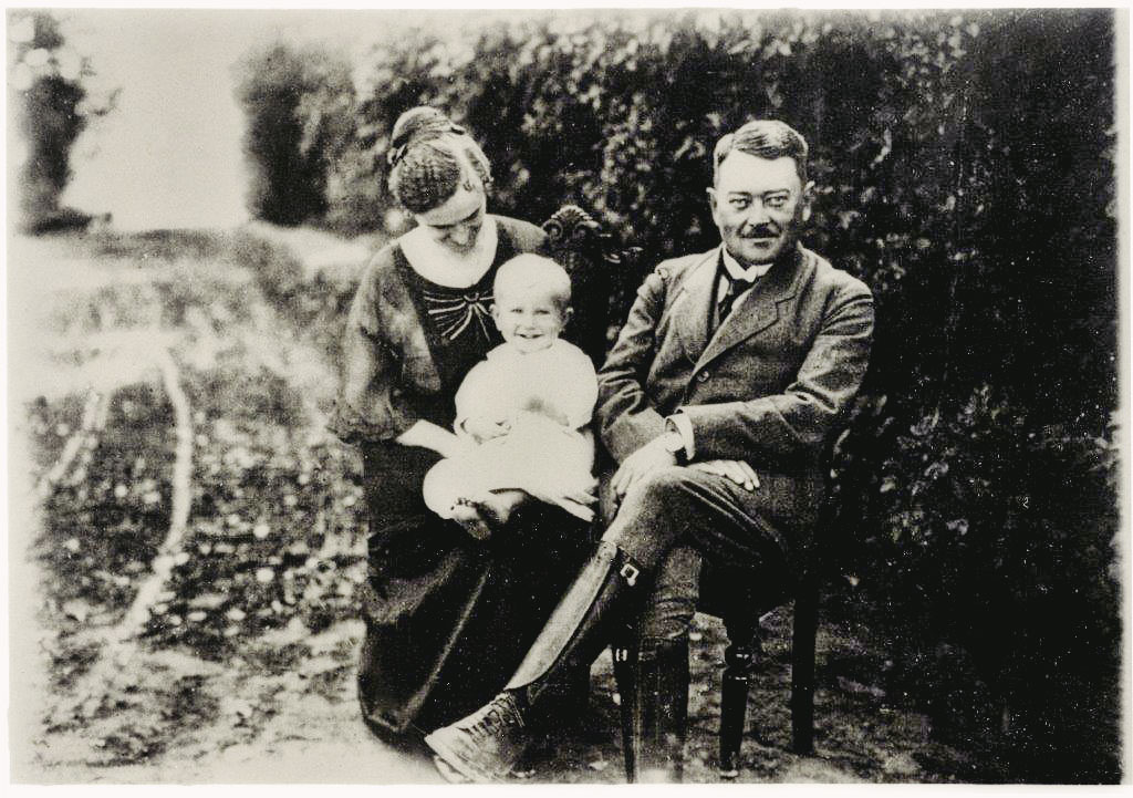 Włodzimierz Kugler z żoną Marią z d. Winczakiewicz i synkiem Andrzejem rok 1920, Brzezie k. Wodzisławia (pow. Jędrzejów)